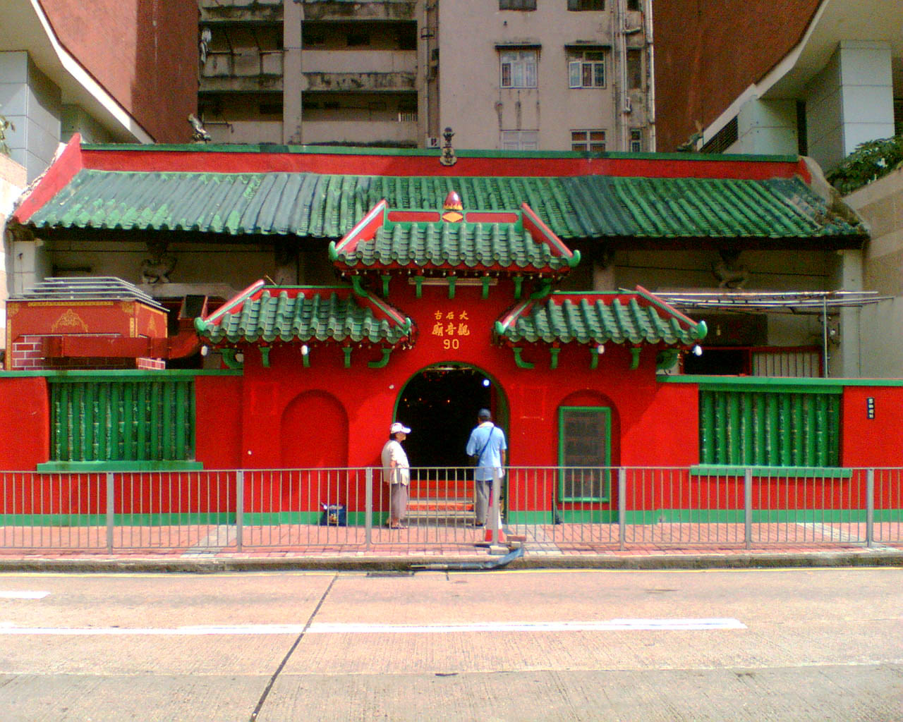 1926年重建的山東街水月宮 - Shui Yuet Kung, Shan Tung Street